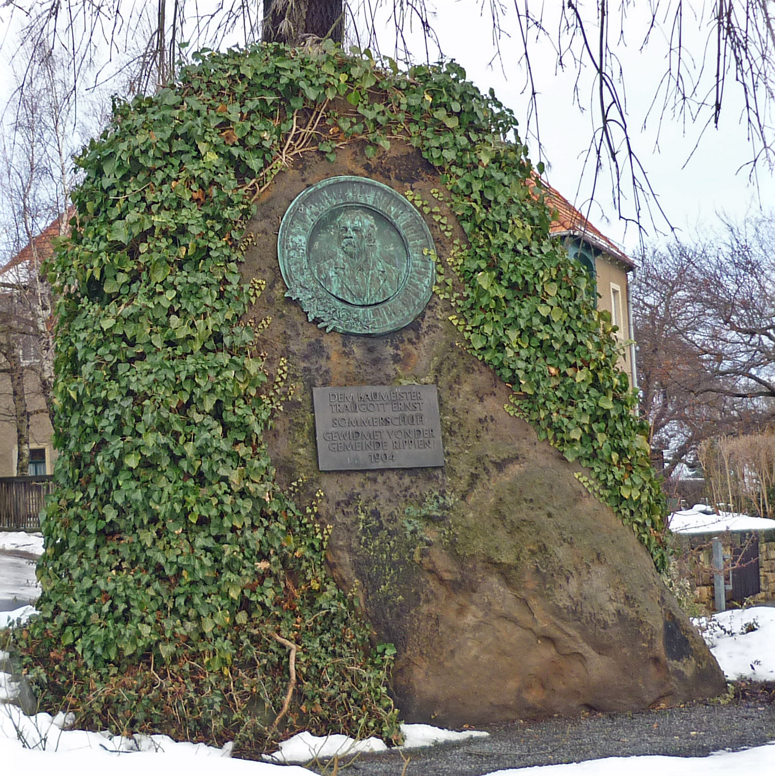 Denkmal für Traugott Ernst Sommerschuh in seinem Geburtsort Rippien, Gemeinde Bannewitz